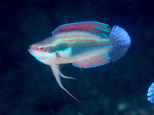 イトヒキベラ Cirrhilabrus temminckii